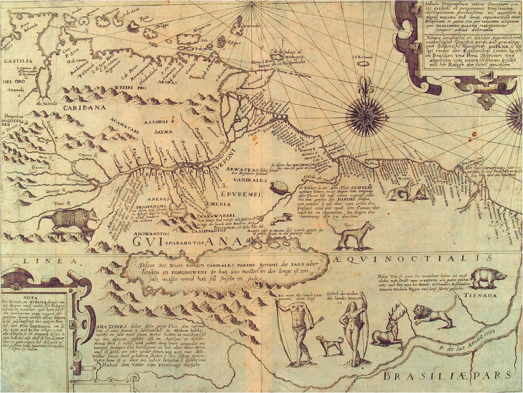 Karte für Band VIII der von Bry herausgegebenen Amerikabeschreibung Kartograf: Walter Raleigh (1554-1618) Texte, Zeichnungen, Auftraggeber und Verleger: Theodor de Bry, Frankfurt am Main Kupferstich 48x36 cm Bestand und Signatur: Herzog August Bibliothek, Wolfenbüttel, HAB Gx 2° 7:4 (2) (alle Angaben nach Sammet, S. 243)